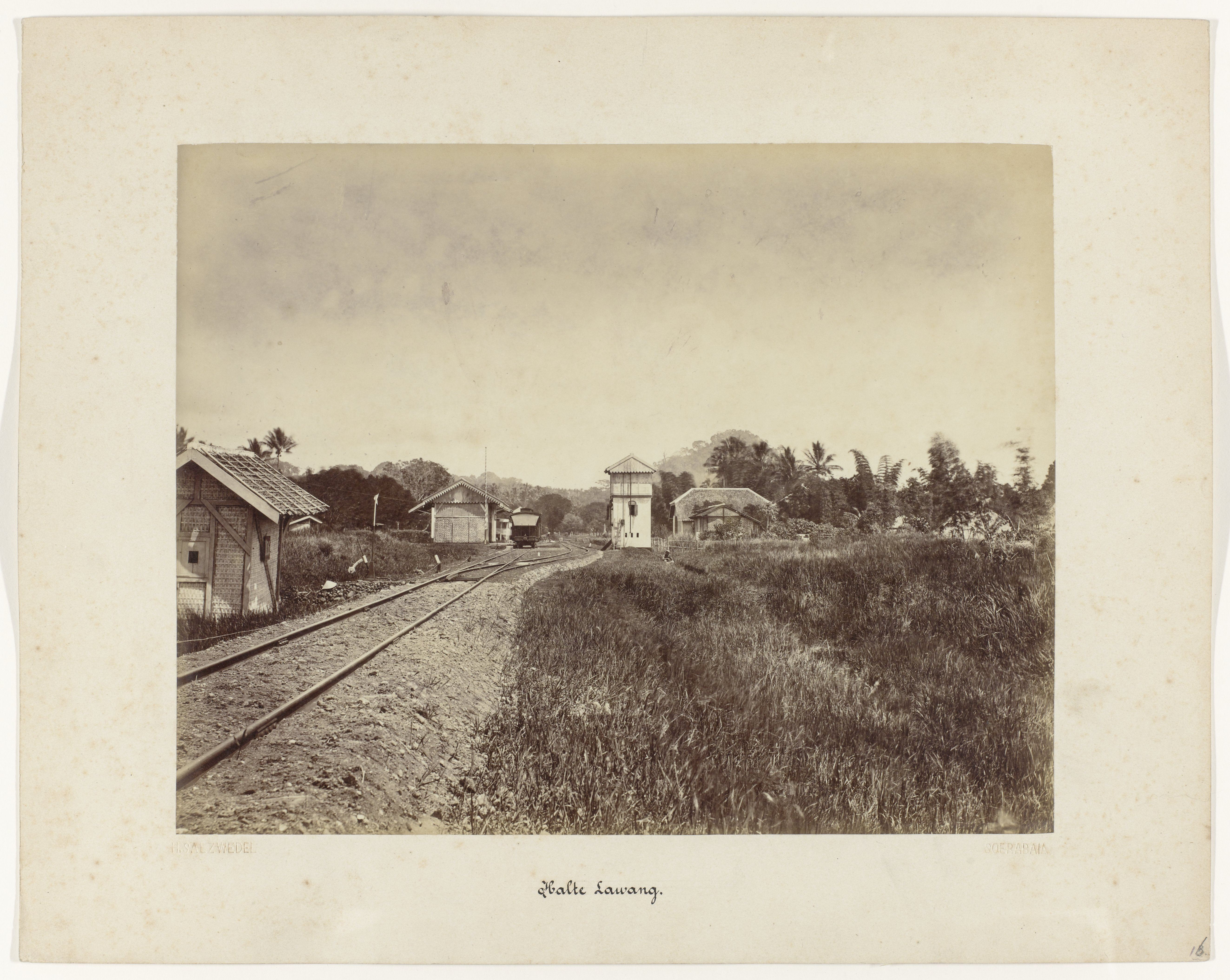 IdentificatieTitel(s): Halte Lawang (titel op object)Staatsspoorwegen op Java (serietitel)Objecttype: foto Objectnummer: NG-1988-26-27Omschrijving: De halte Lawang op de lijn Banjil-Malang. Bij het station staat een trein op het spoor. Onderdeel van een groep van 62 foto's in een doos met het opschrift "Staatsspoorwegen op Java" uit 1888.VervaardigingVervaardiger: fotograaf: Herman Salzwedel (vermeld op object)Plaats vervaardiging: SurabayaDatering: 1880 - 1888Fysieke kenmerken: albuminedrukMateriaal: fotopapier Techniek: albuminedrukAfmetingen: foto: h 215 mm × b 275 mmkarton: h 300 mm × b 370 mmOnderwerpWanneer: 1880 - 1888Waar: LawangVerwerving en rechtenVerwerving: aankoop 30-aug-1988Copyright: Publiek domein